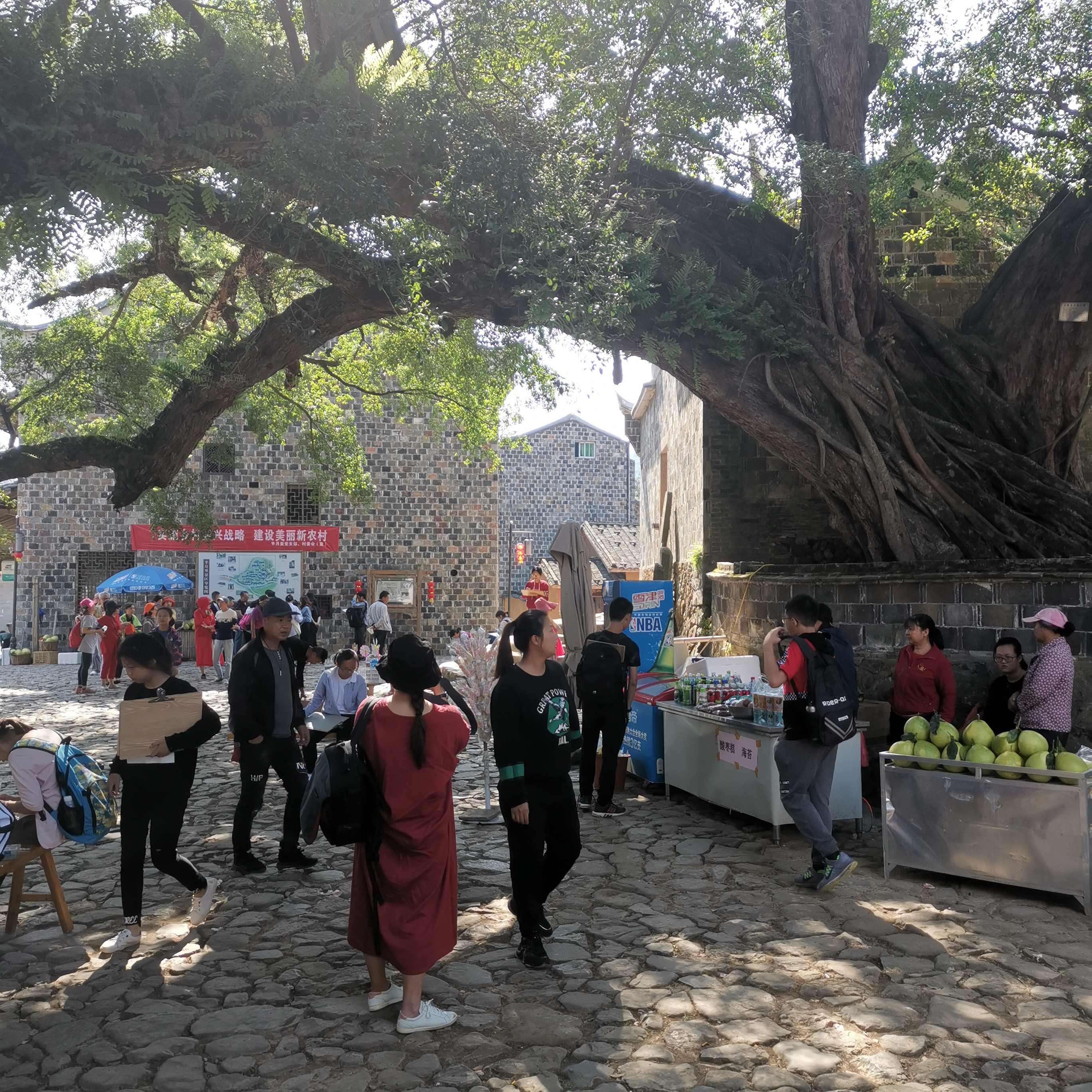 中文（中国大陆）: 福建省霞浦县溪南镇白露坑行政村半月里